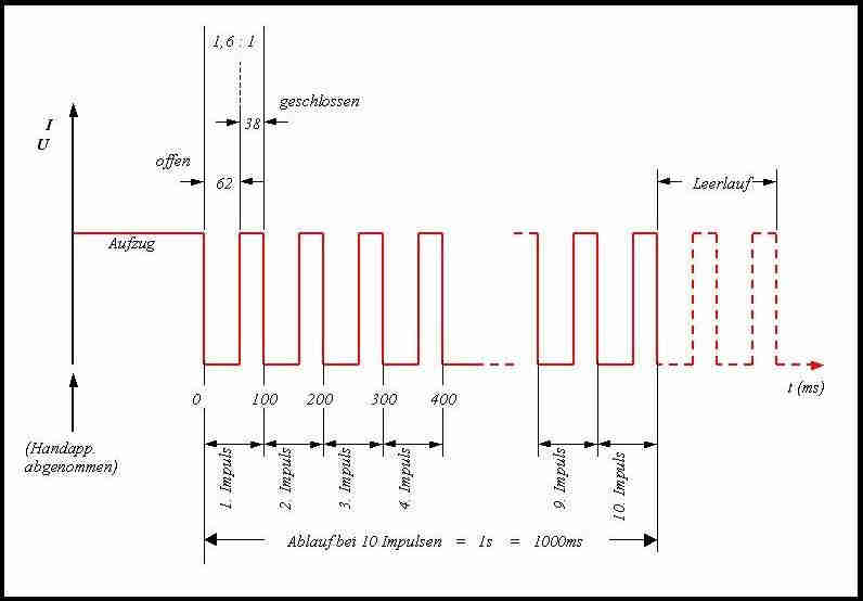 Diagramm des Nummern-Schalter-Impuls-Kontakt (n s i)